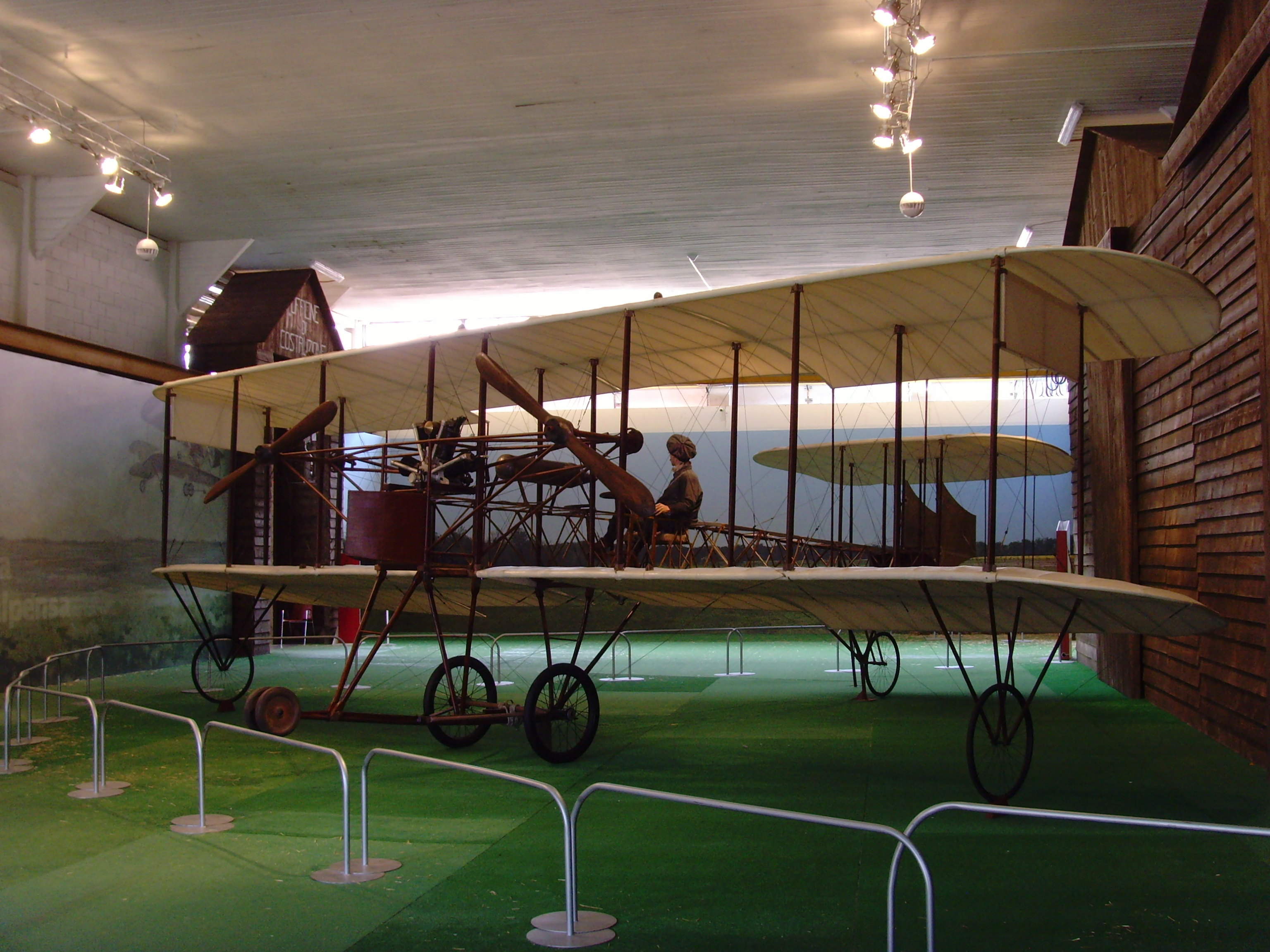 11 Volandia - Caproni Ca 1